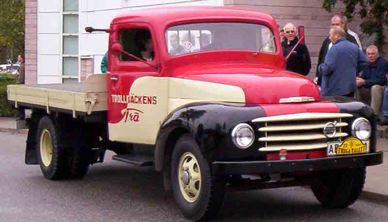 Volvo L341 Truck 1952